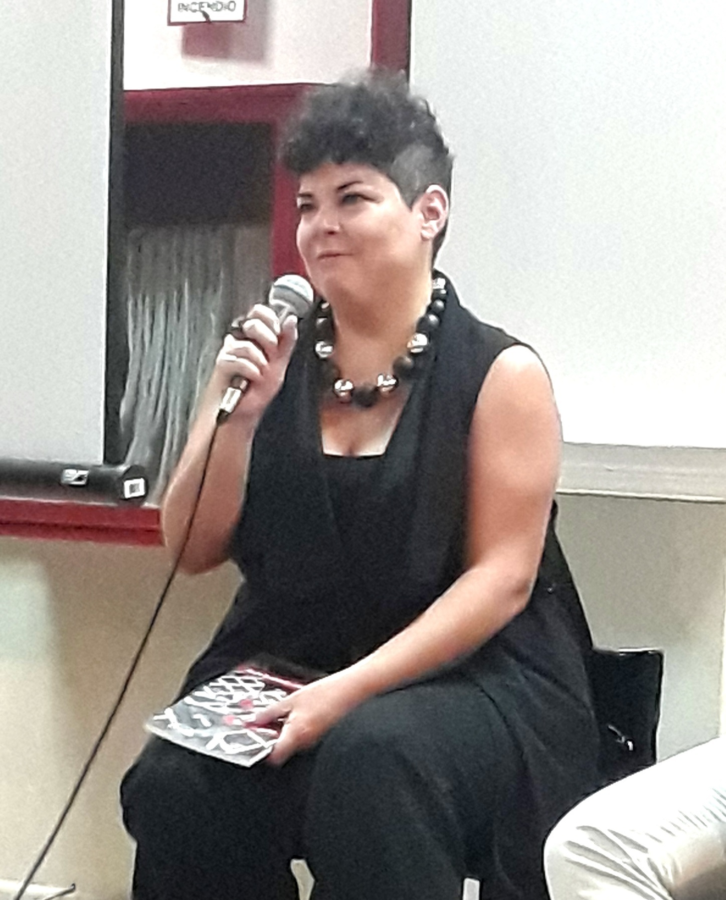 María Fernanda Ampuero en un foro en Guayaquil (26 de julio de 2018)